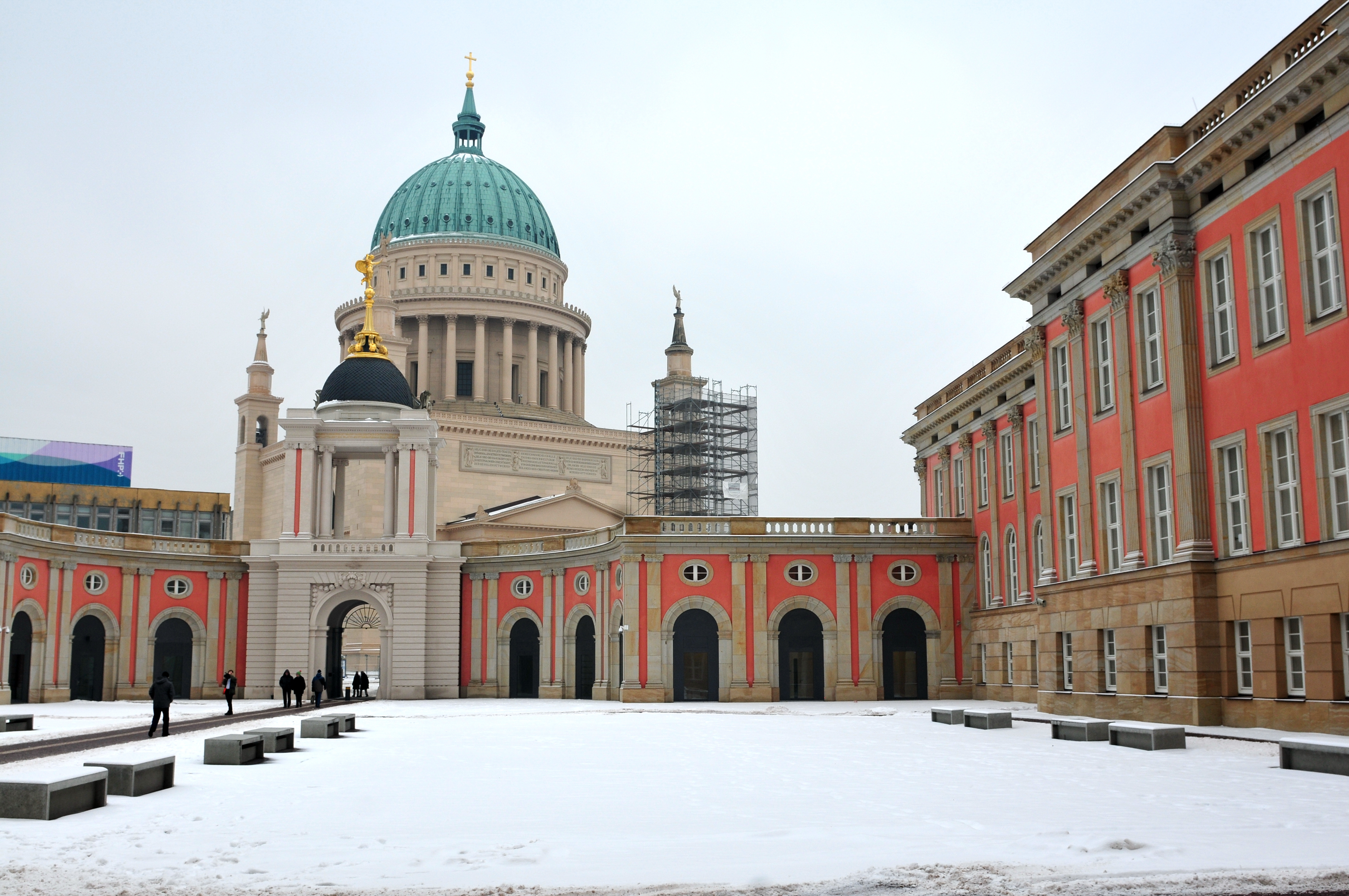 Landtag Brandenburg in Potsdam